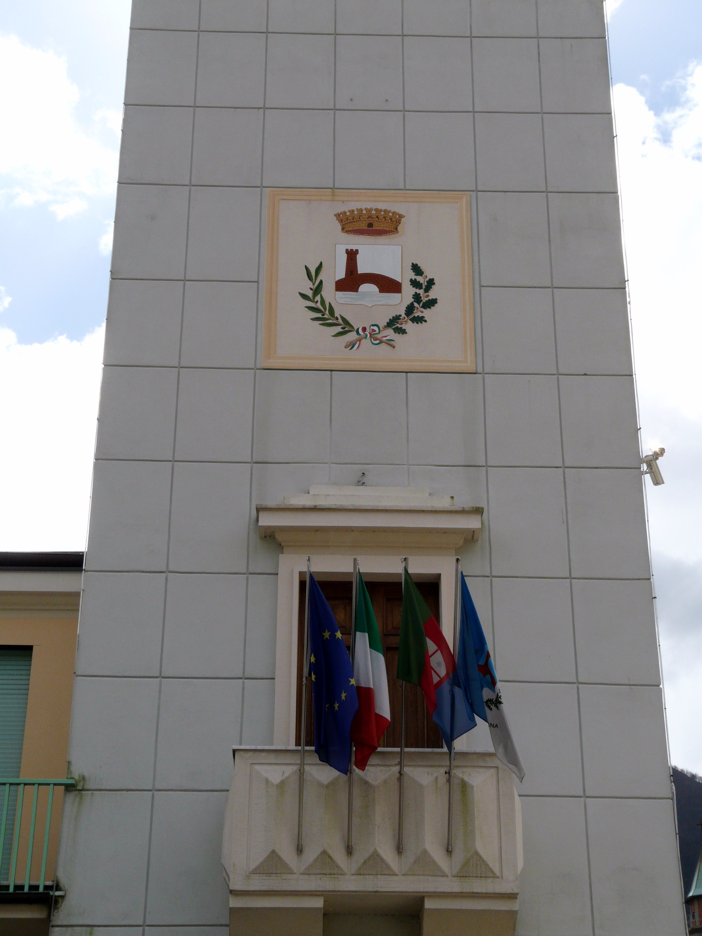 Municipio di Cicagna, Liguria, Italia